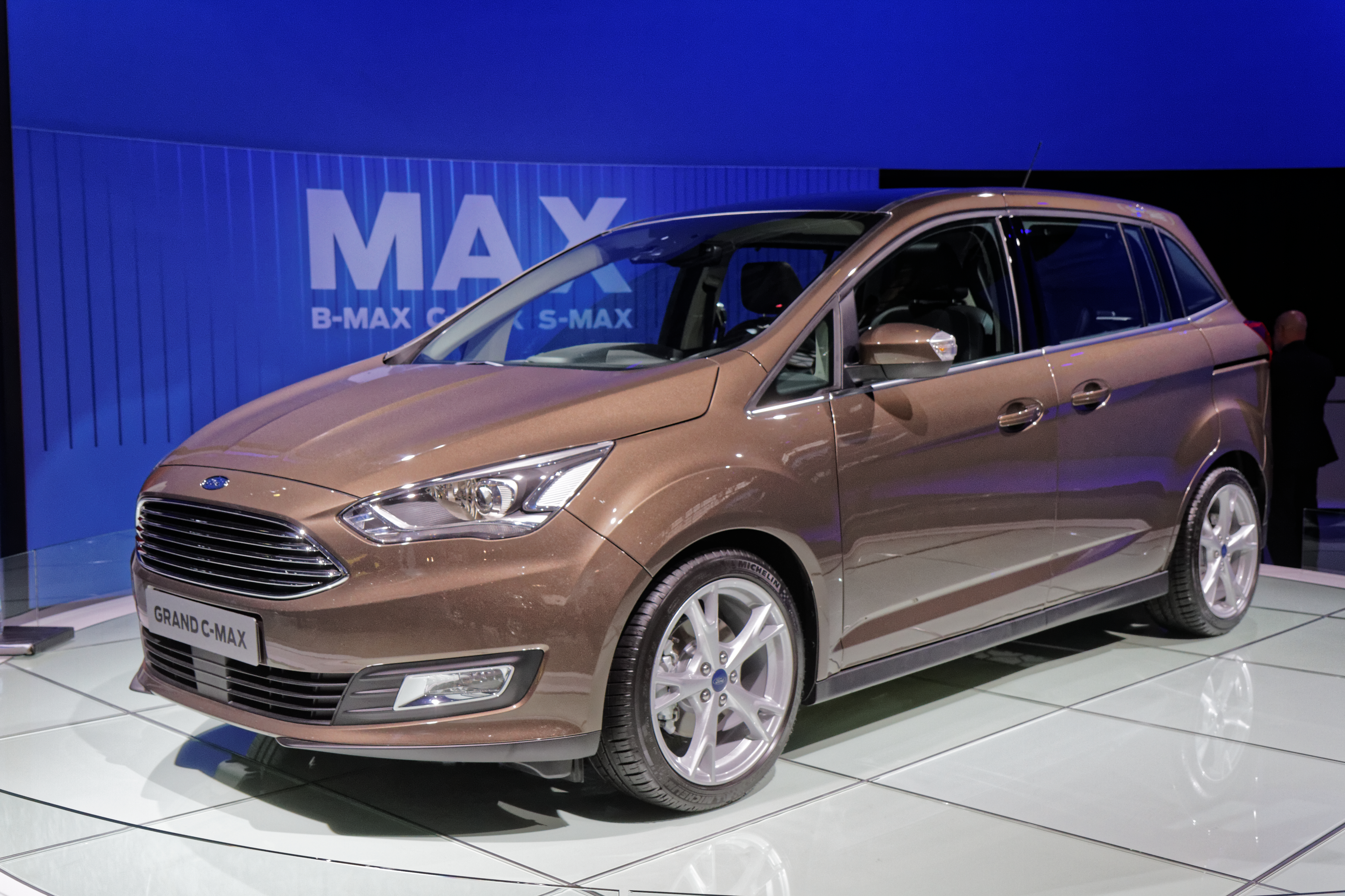 Une Ford grand C-MAX présentée lors du mondial de l'automobile de Paris 2014.